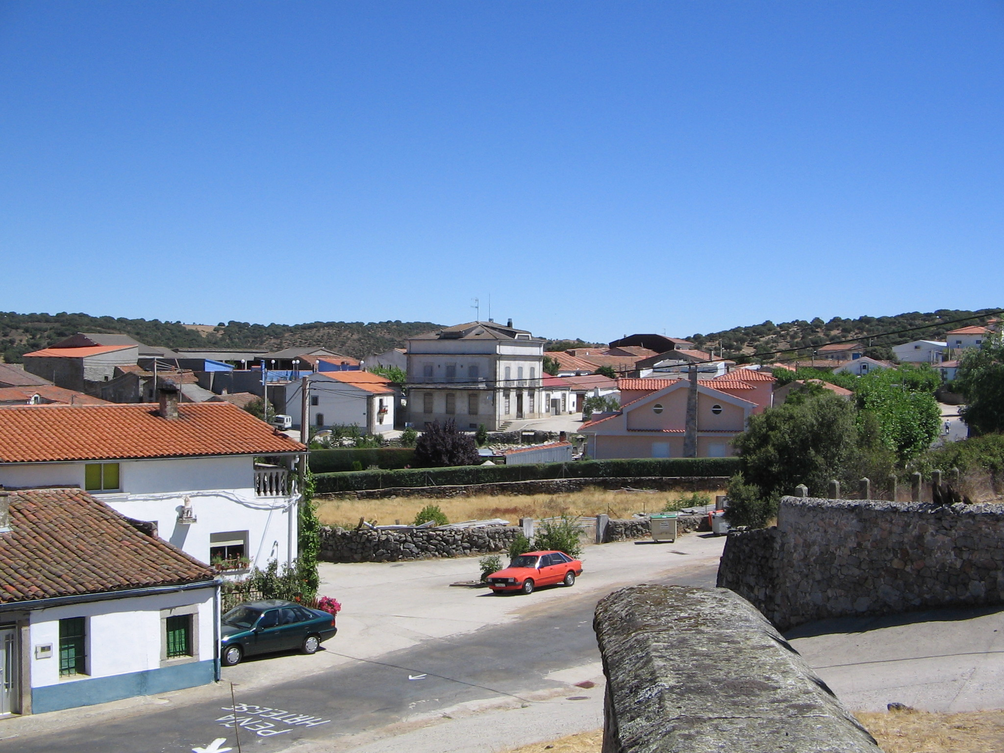 Zona de Fuentes de Béjar entre calles García y Cascón, Turmero y Calle Constitución